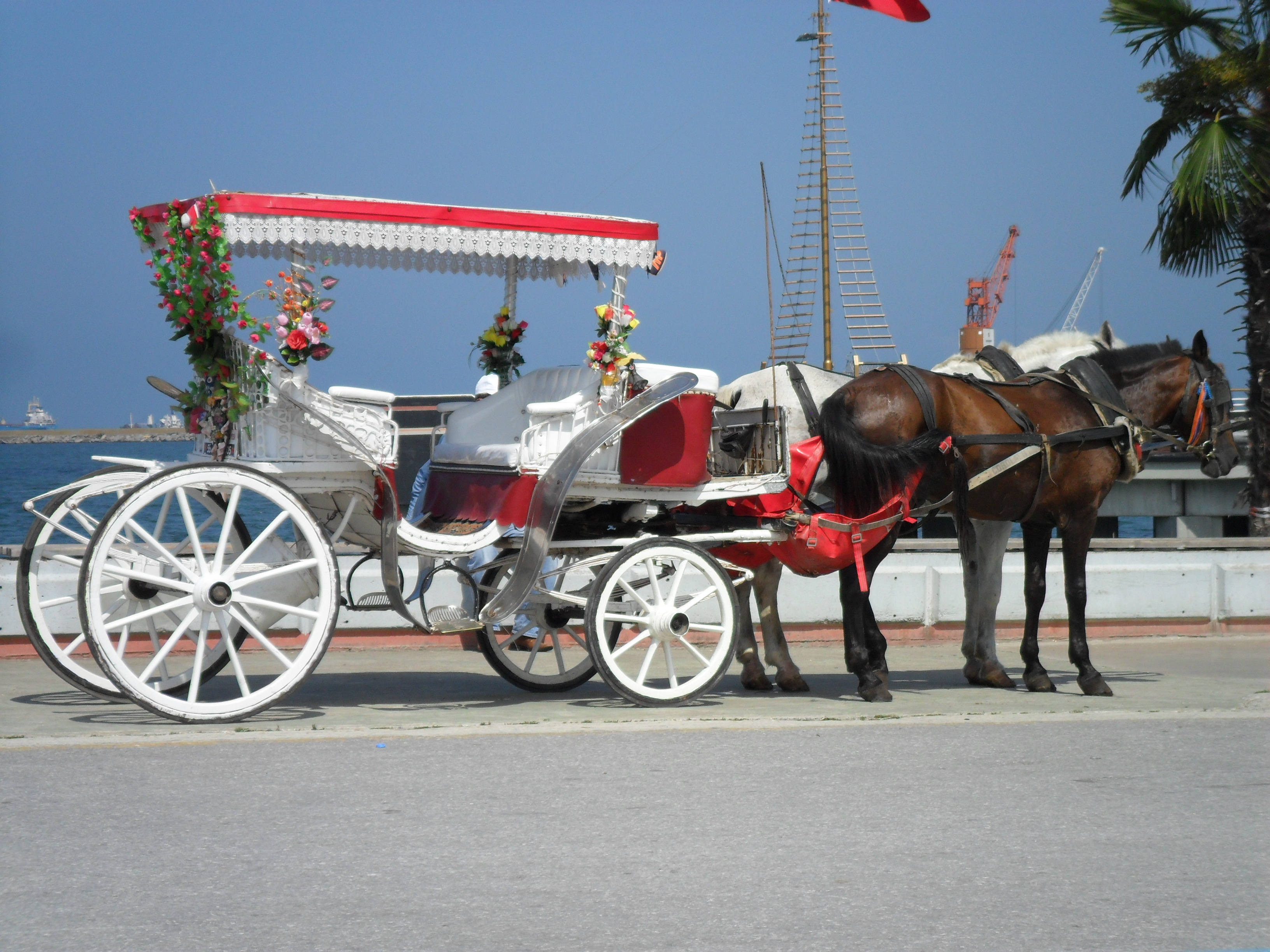 Samsun Sahil Yolu'nda bir fayton.